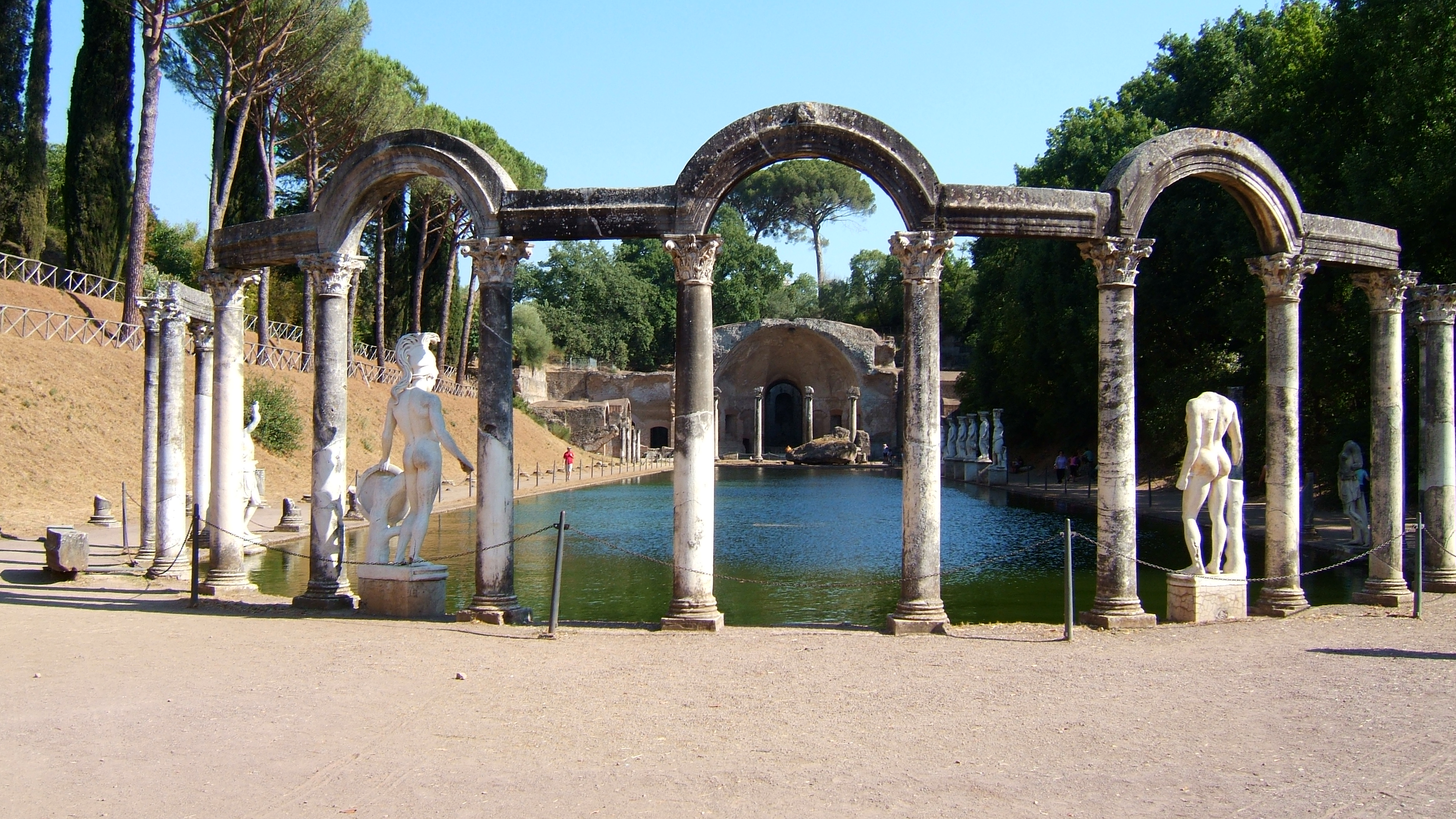 Canopus at Villa Adriana in Tivoli.